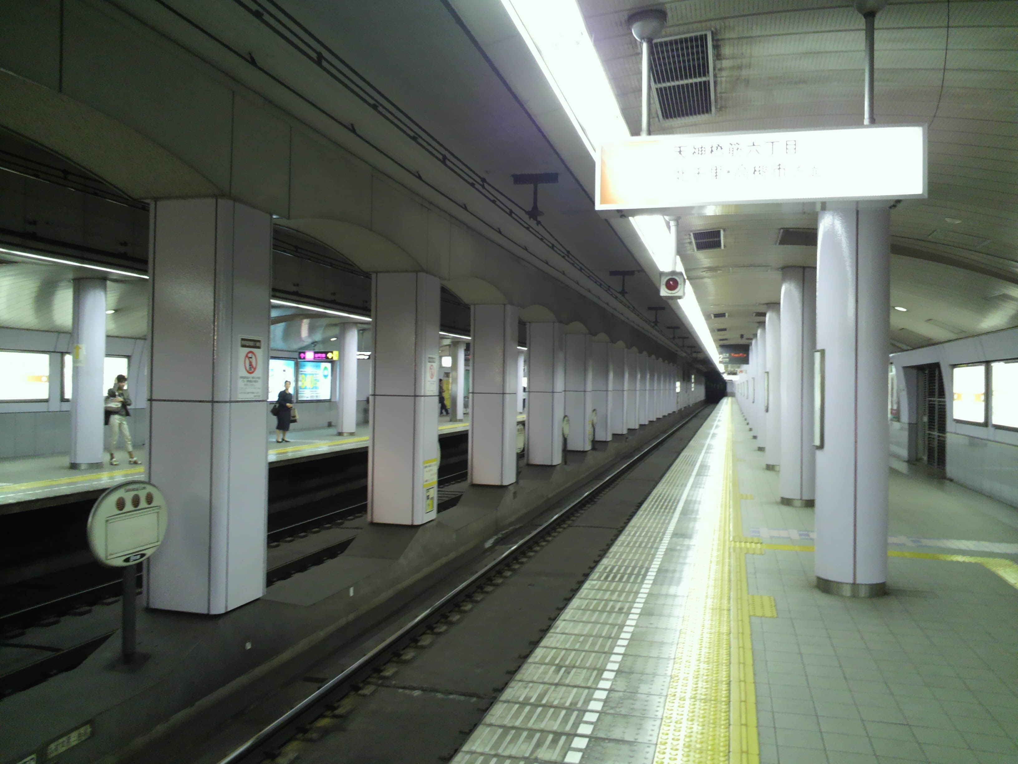 南森町駅の堺筋線ホーム